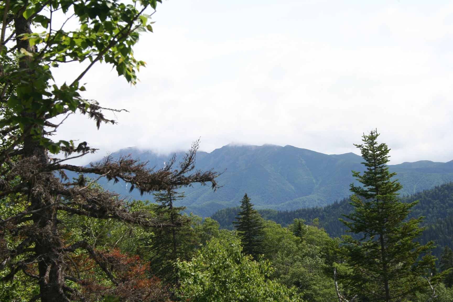 Вид на гору Лопатина (остров Сахалин) с Пиленговского хребта.